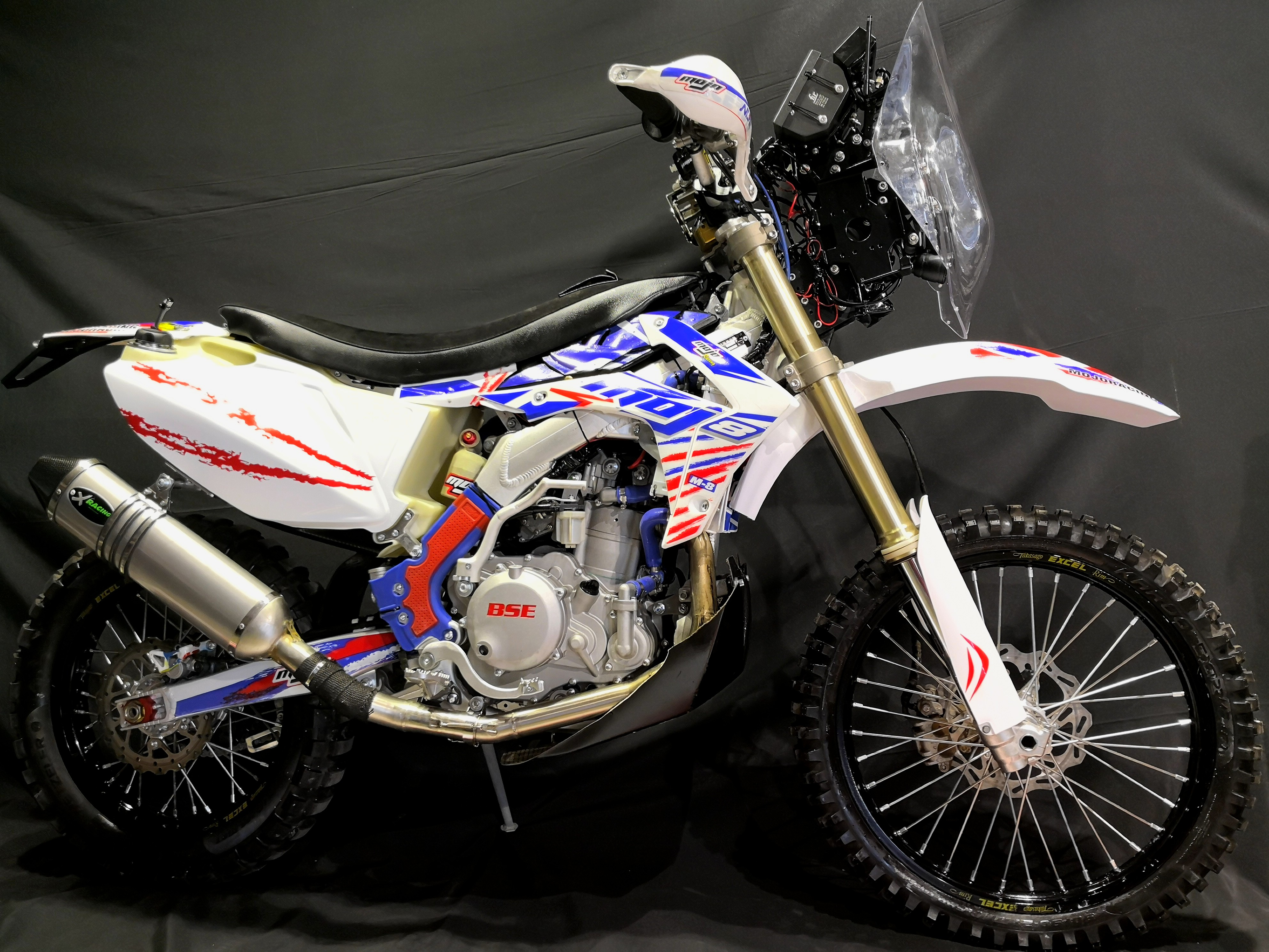 BOSUER 450 rally